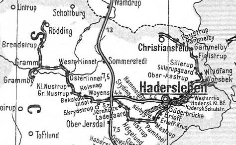 Haderslebener_Kreisbahn_Großer_Atlas_der_Eisenbahnen_von_Mitteleuropa_1902.jpg